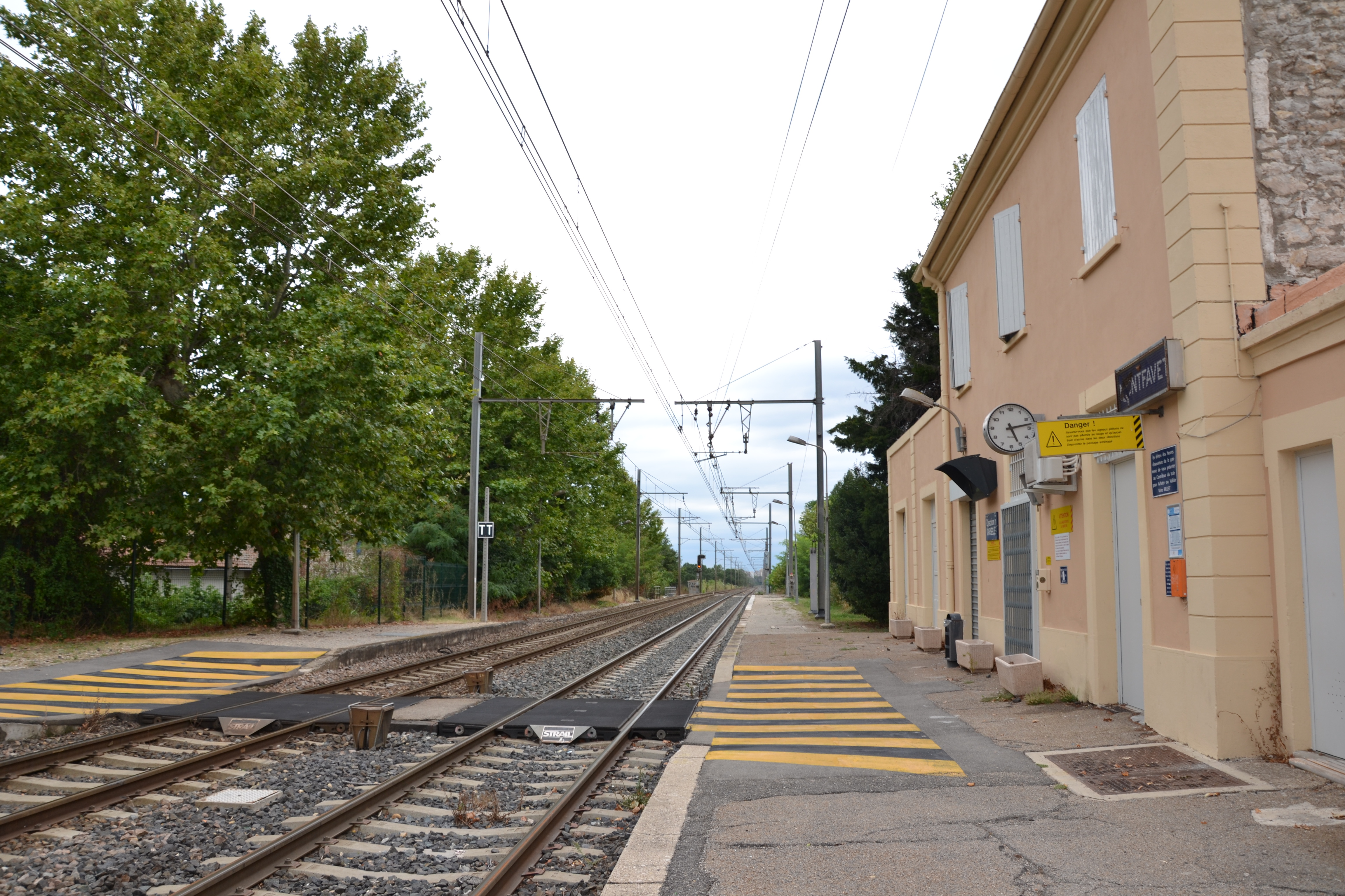 Gare de Montfavet : quai vers Marseille